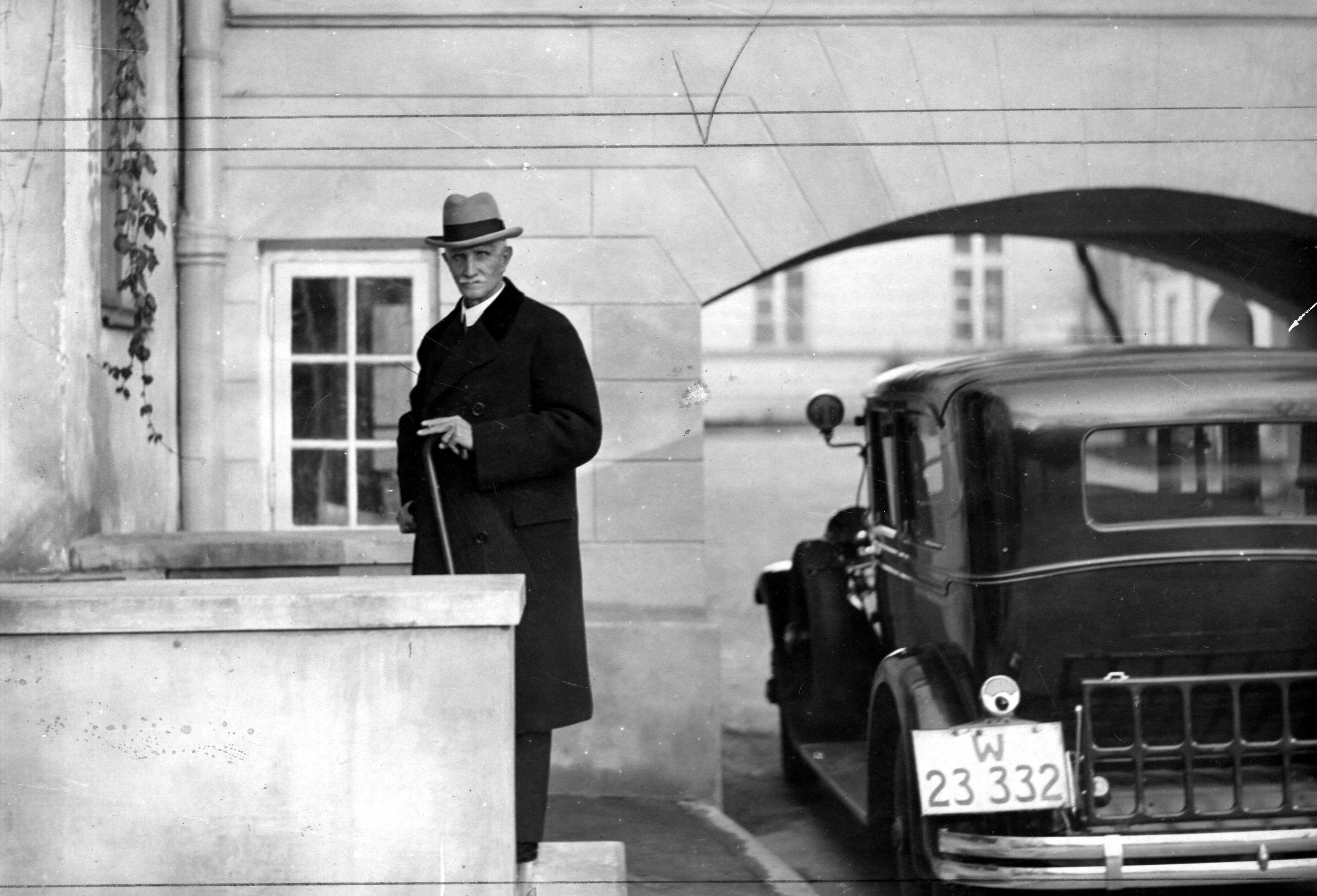 Konferencja prezydenta RP Ignacego Mościckiego z marszałkiem Sejmu Ignacym Daszyńskim na Zamku Królewskim w Warszawie. Marszałek Sejmu Ignacy Daszyński po powrocie z konferencji wchodzi do swego mieszkania w Sejmie.